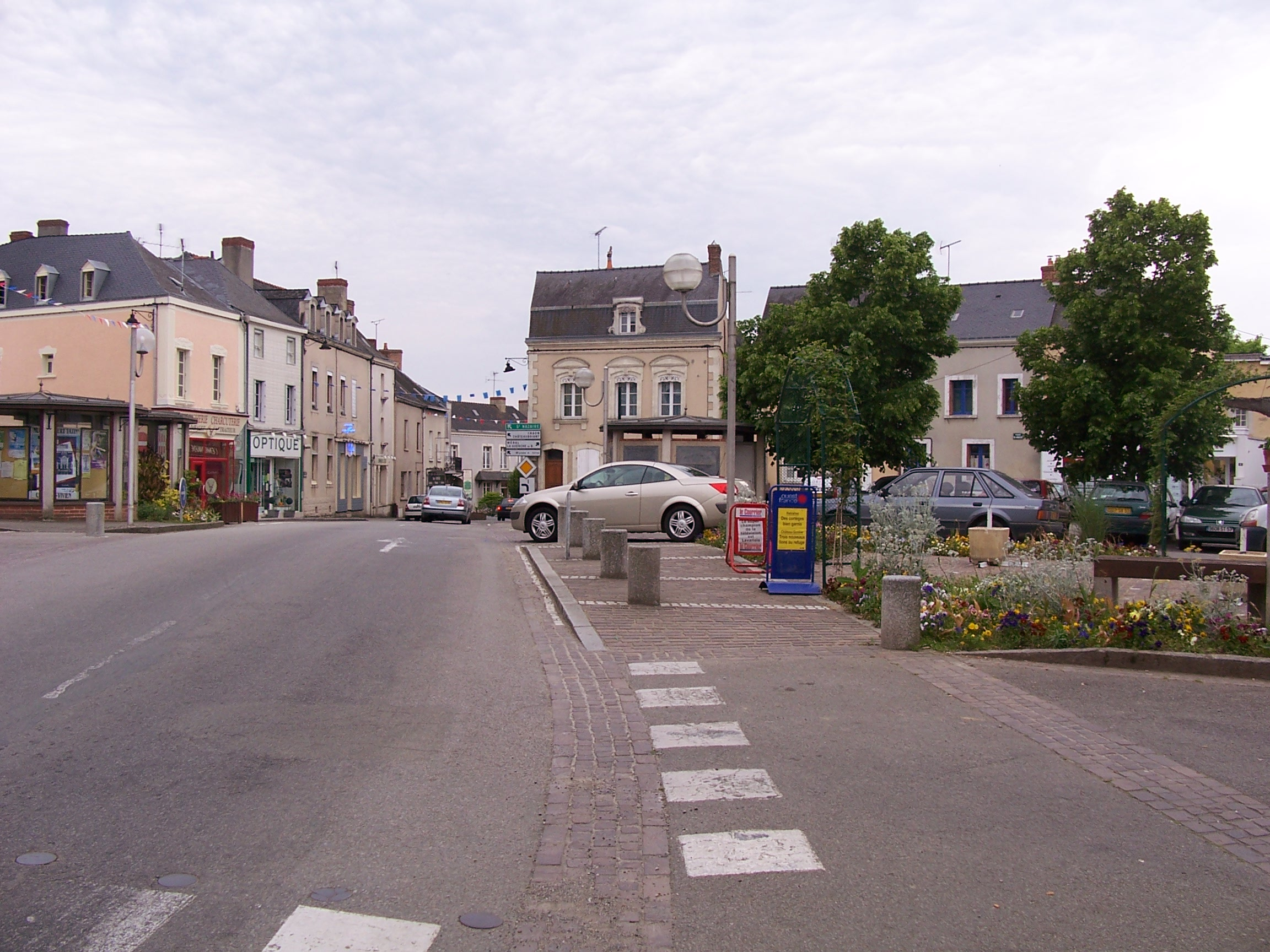 Het centrum van Cossé-le-Vivien.